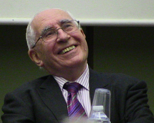 Jacques Lesourne au colloque pour la mémoire de Georges Besse, à MINES ParisTech